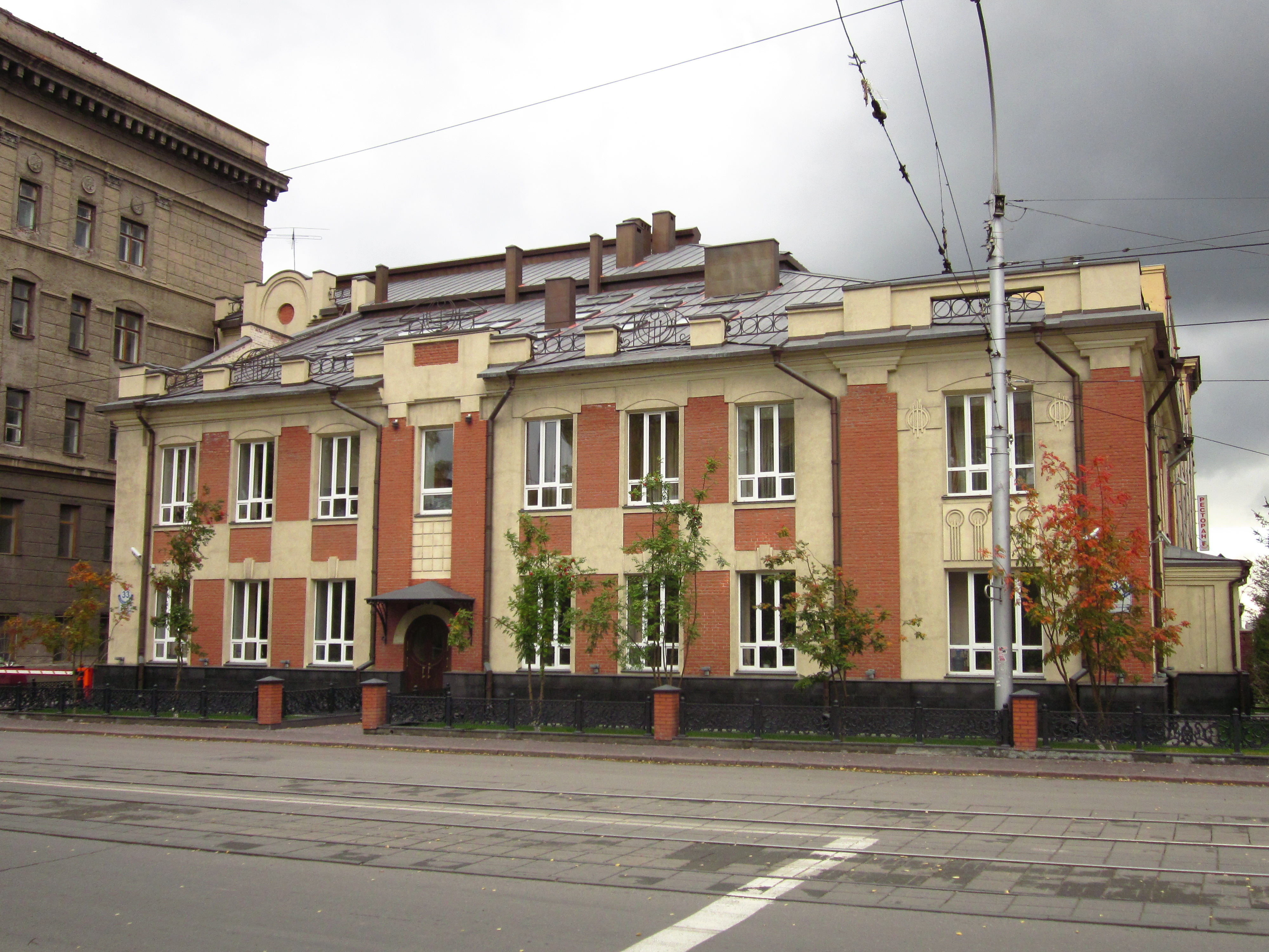 Дом жилой начала XX в. г. Новосибирск, Центр-он, ул. М.Горького, 80 (ул. Серебренниковская, 33). Памятник архитектуры.